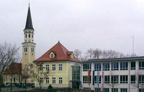 St. Benedikt in Odelzhausen, sowie das Rathaus der Verwaltungsgemeinschaft der drei Gemeinden Odelzhausen, Pfaffenhofen an der Glonn und Sulzemoos.